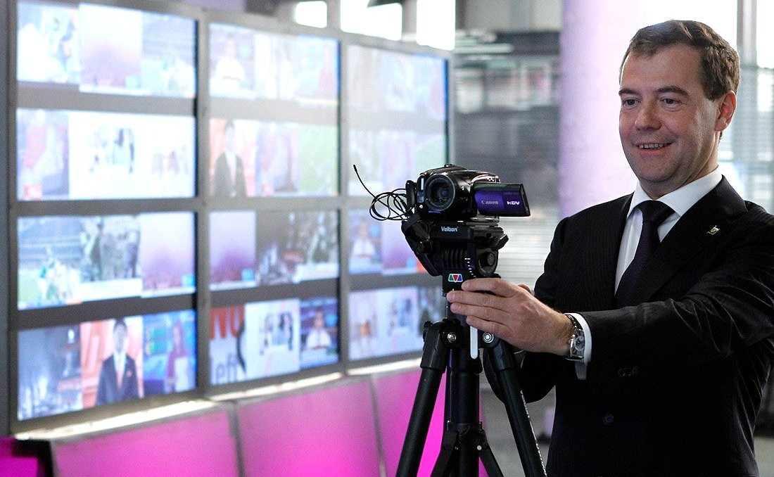 Посещение студии телеканала «Дождь»